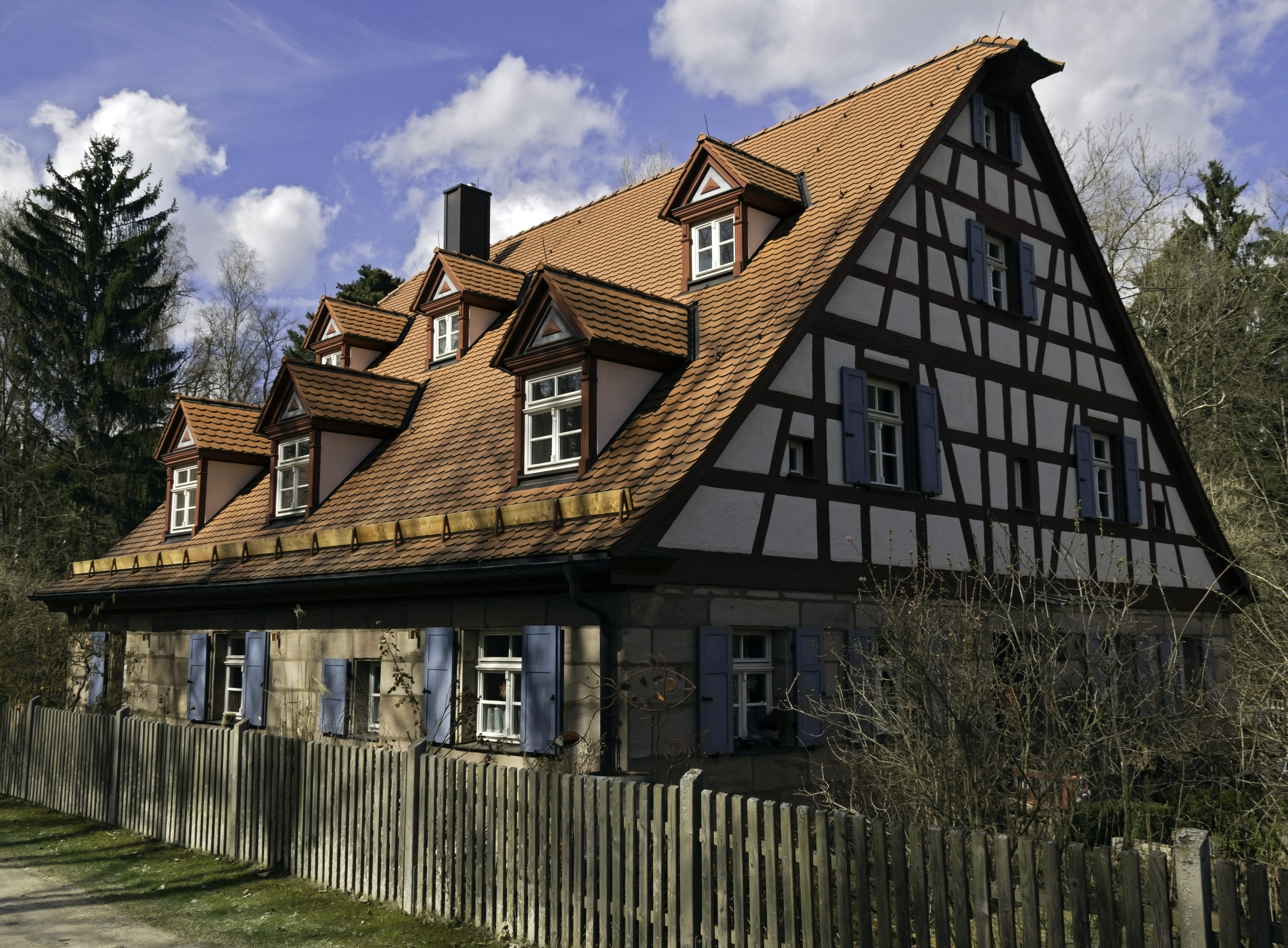 Ehemaliges Forsthaus, Nerreth, Wendelstein, Fachwerk